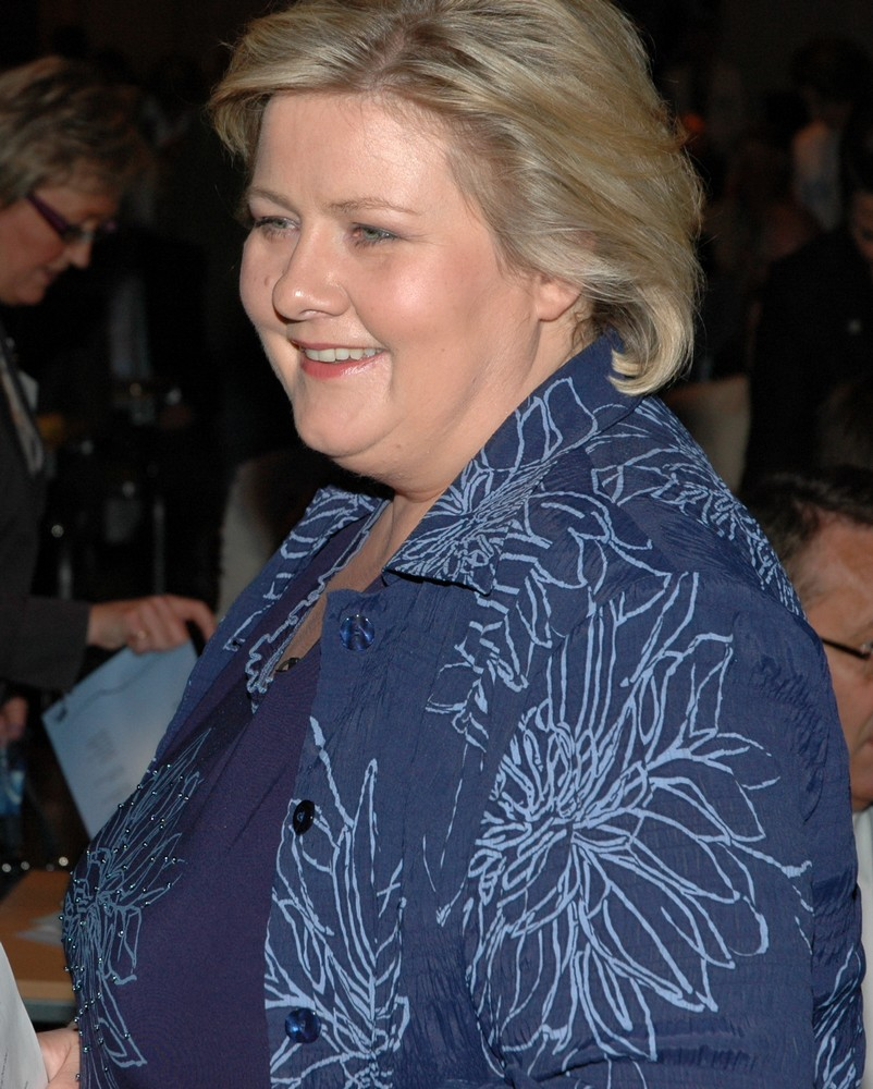 Erna Solberg, Høyres leder og tidligere kommunalminister